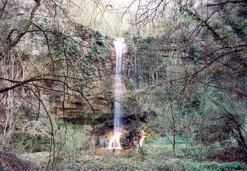 La cascata dell'infernaccio, tra Celleno e Grotte Santo Stefano